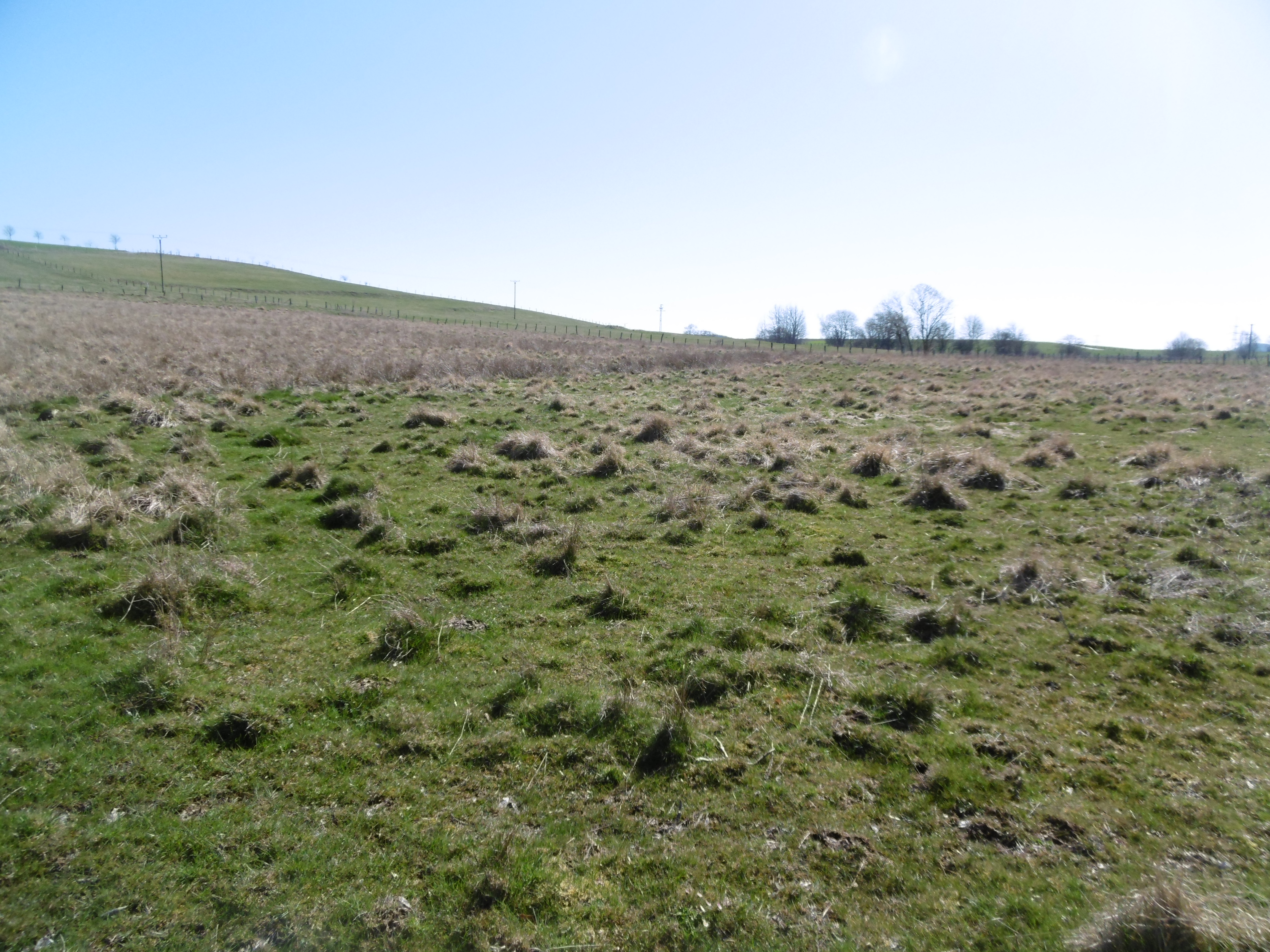 Blick von Teichen am Prinzknapp nach Süden ins Landschaftsschutzgebiet Fauler Bruch / Hemmeker Bruch.